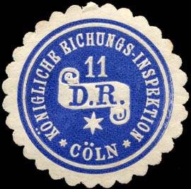 Sealing stamp Title: K. Eichungs - Inspektion 11 D.R. Cöln Description: Eichamt, Waage, blau, weiß, geprägt Place: Cöln size: 4 cm